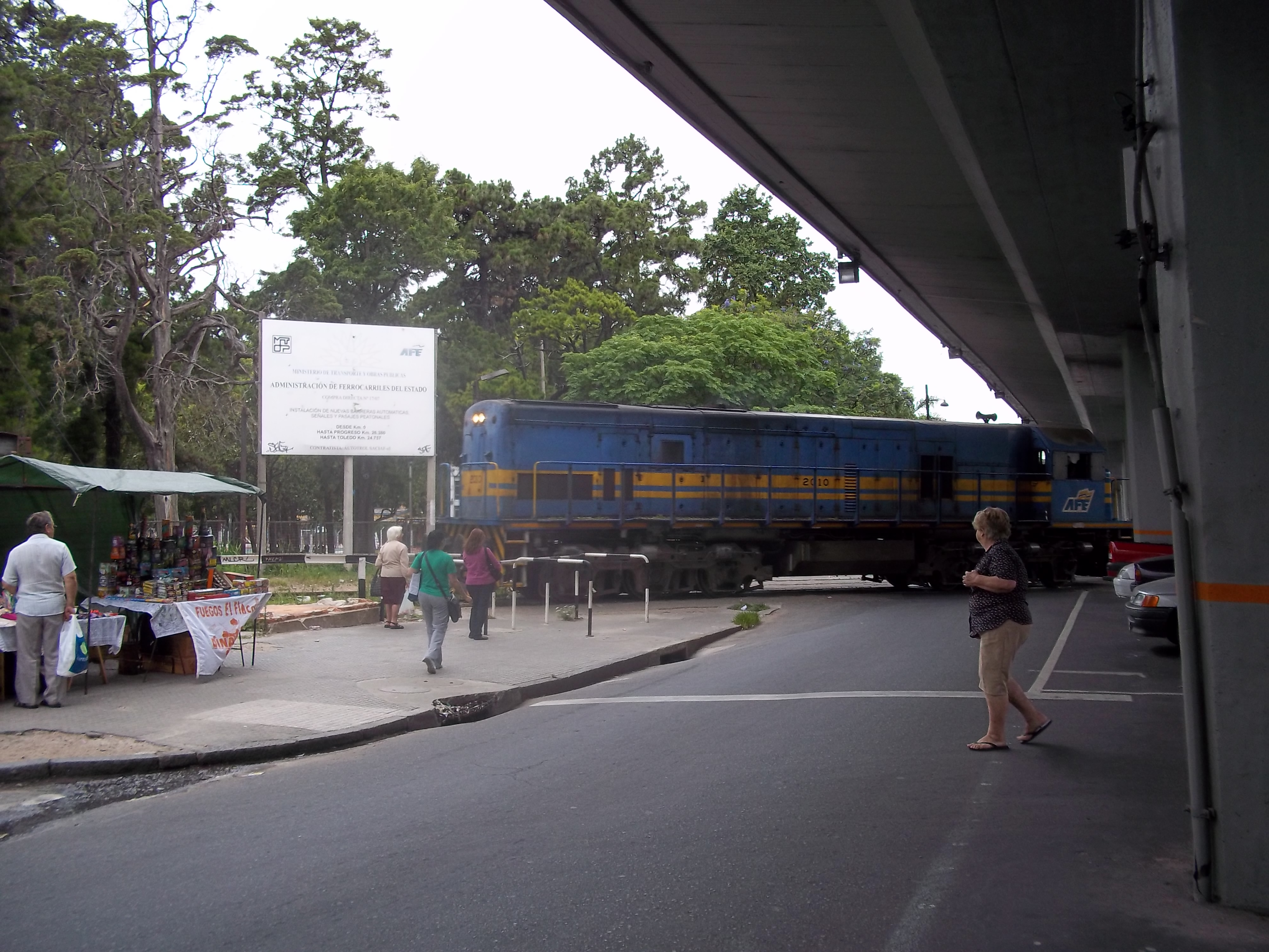 Paso a nivel del ferrocarril en el Paso Molino. A la derecha se aprecia parte de la estructura del viaducto.